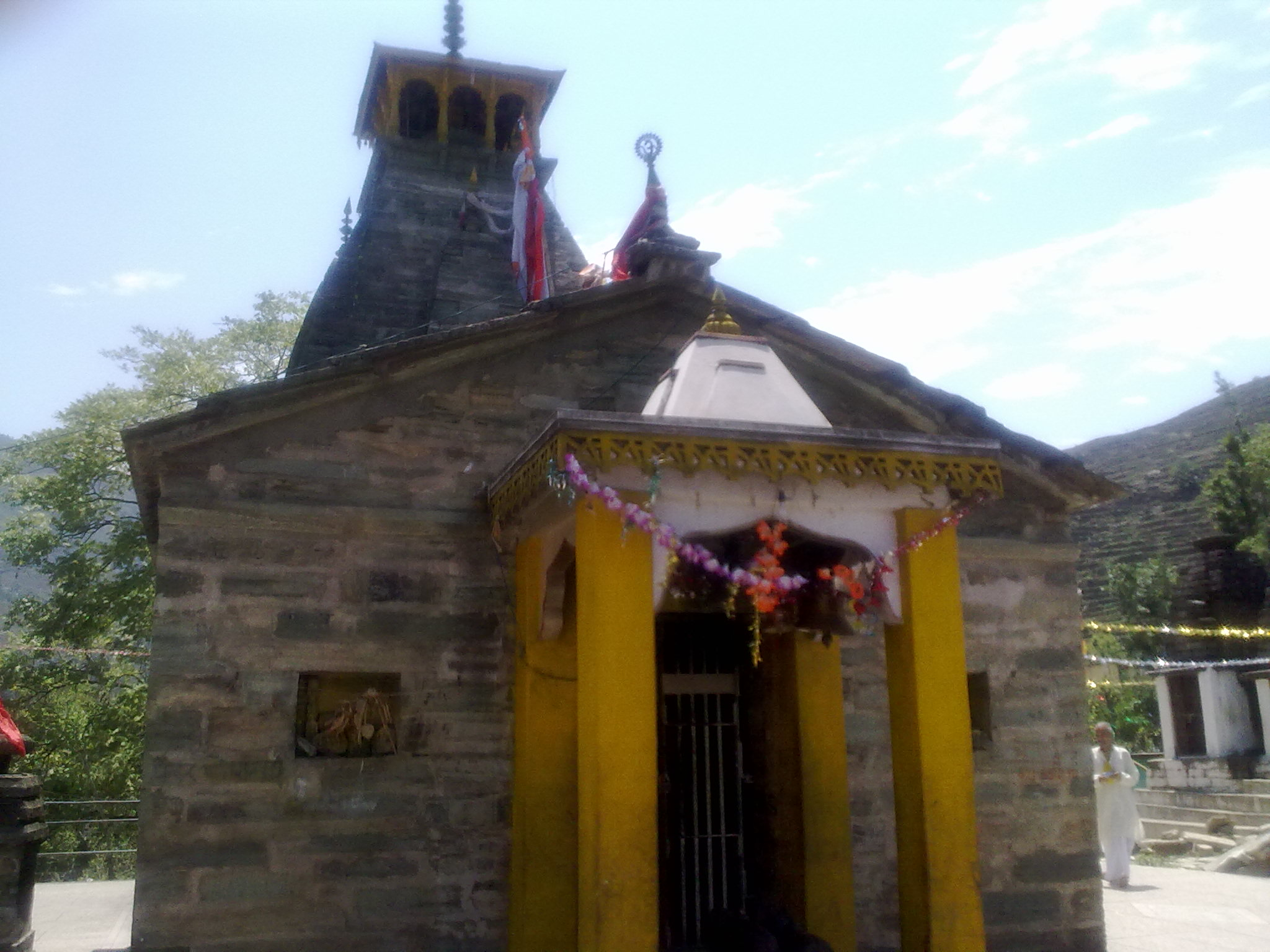 उत्तराखण्ड के रुद्रप्रयाग जिले के फलासी नामक गाँव में स्थित तुंगनाथ मन्दिर।